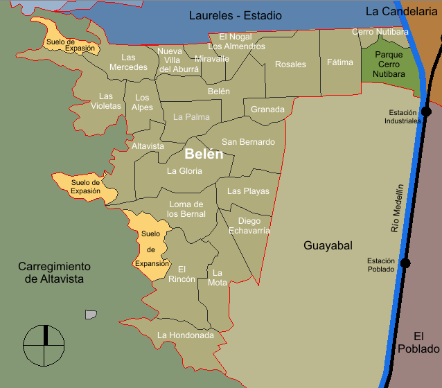 mapa de la división barrial de la comuna Belén. Medellín, Colombia.